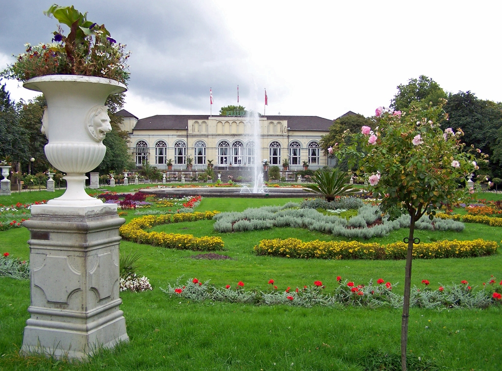 Der zum Teil nach Plänen von Peter-Joseph Lenné angelegte Zier- und Lustgarten „Flora“ wurde im August 1864 eingeweiht. Geplant ist nun eine Generalinstantsetzung und Wiederherstellung der alten Gebäudesymmetrie der Flora für ca. 22 Mio. Euro, die Ende November 2010 vollendet sein soll (Köln-Kongress). Der Palmensalon mit gläsernem Tonnendach wird dann rund 420 Quadratmeter groß sein und einen wunderschönen Ausblick auf beide Seiten der Flora ermöglichen. (Quelle: Kölner Wochenspiegel, 08-10-2008)